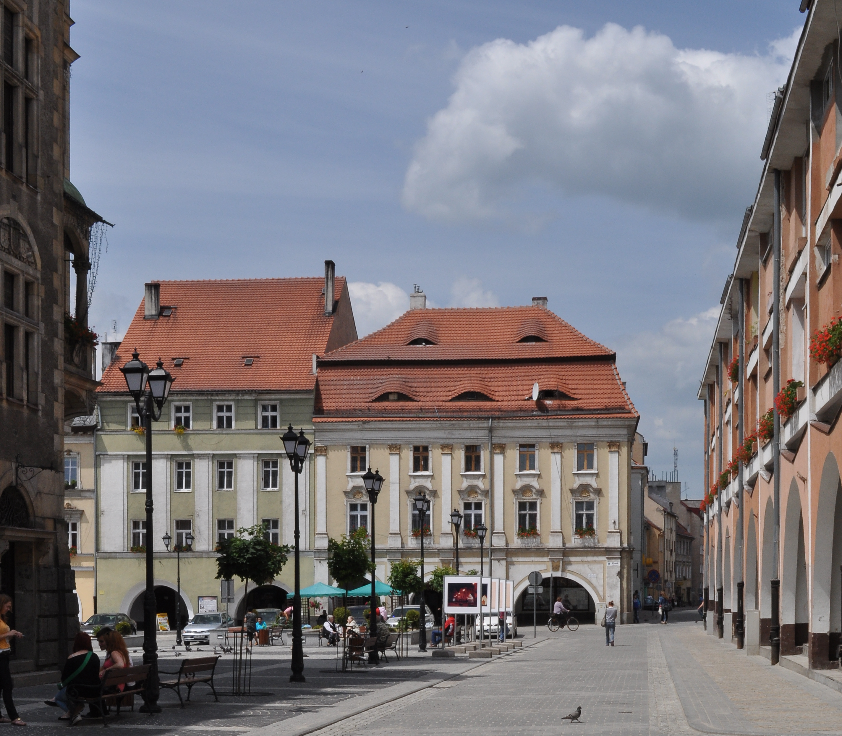 Jawor - Rynek (układ urbanistyczny)